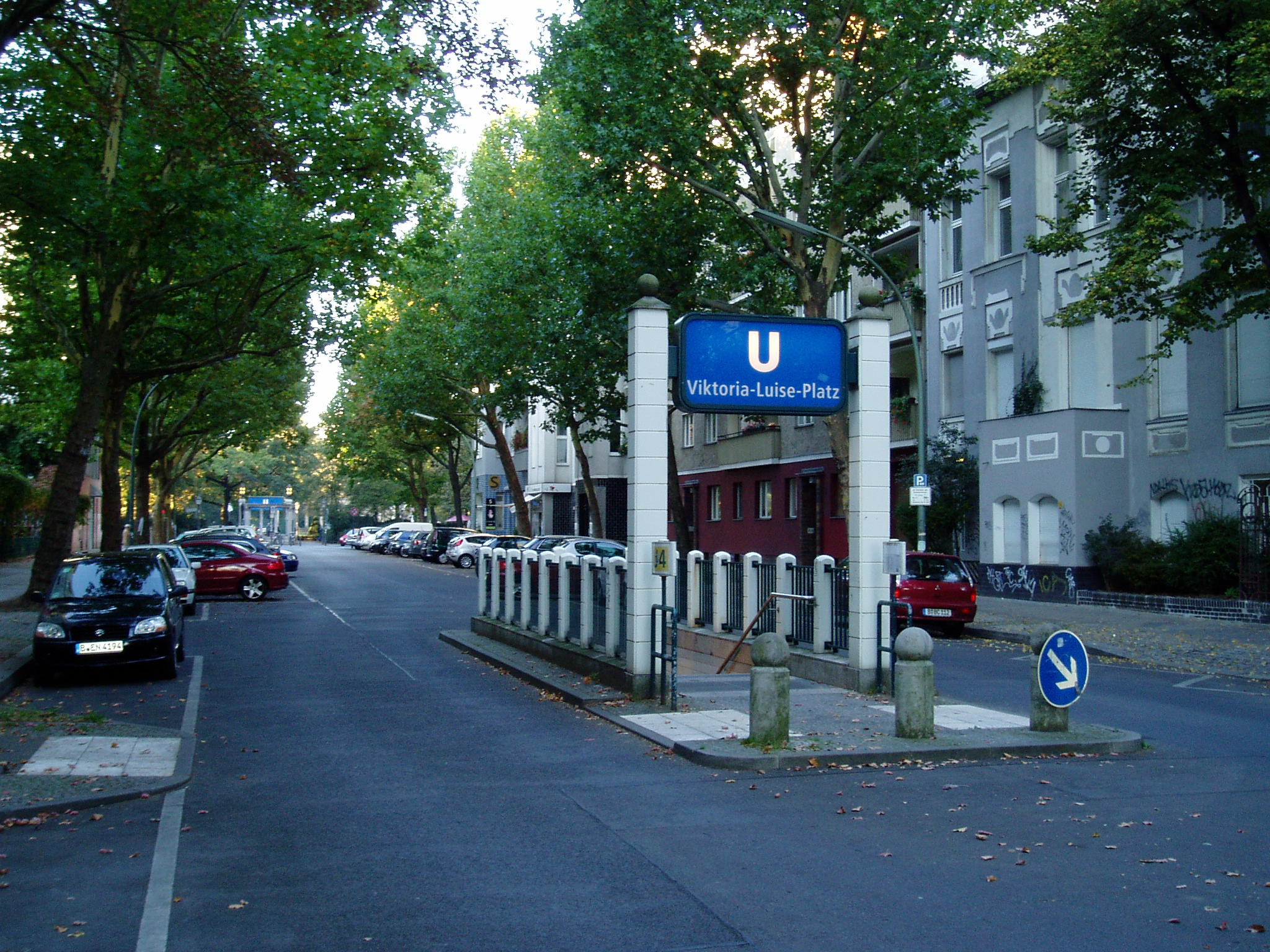 Berlin U-Bahnhof Viktoria-Luise-Platz, nordöstlicher Zugang in der Motzstraße